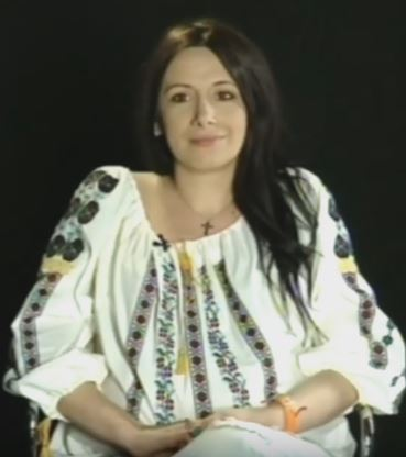 Nata Albot, la emisiunea Interpol, în iulie 2016